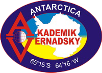 Логотип станції Академік Вернадський